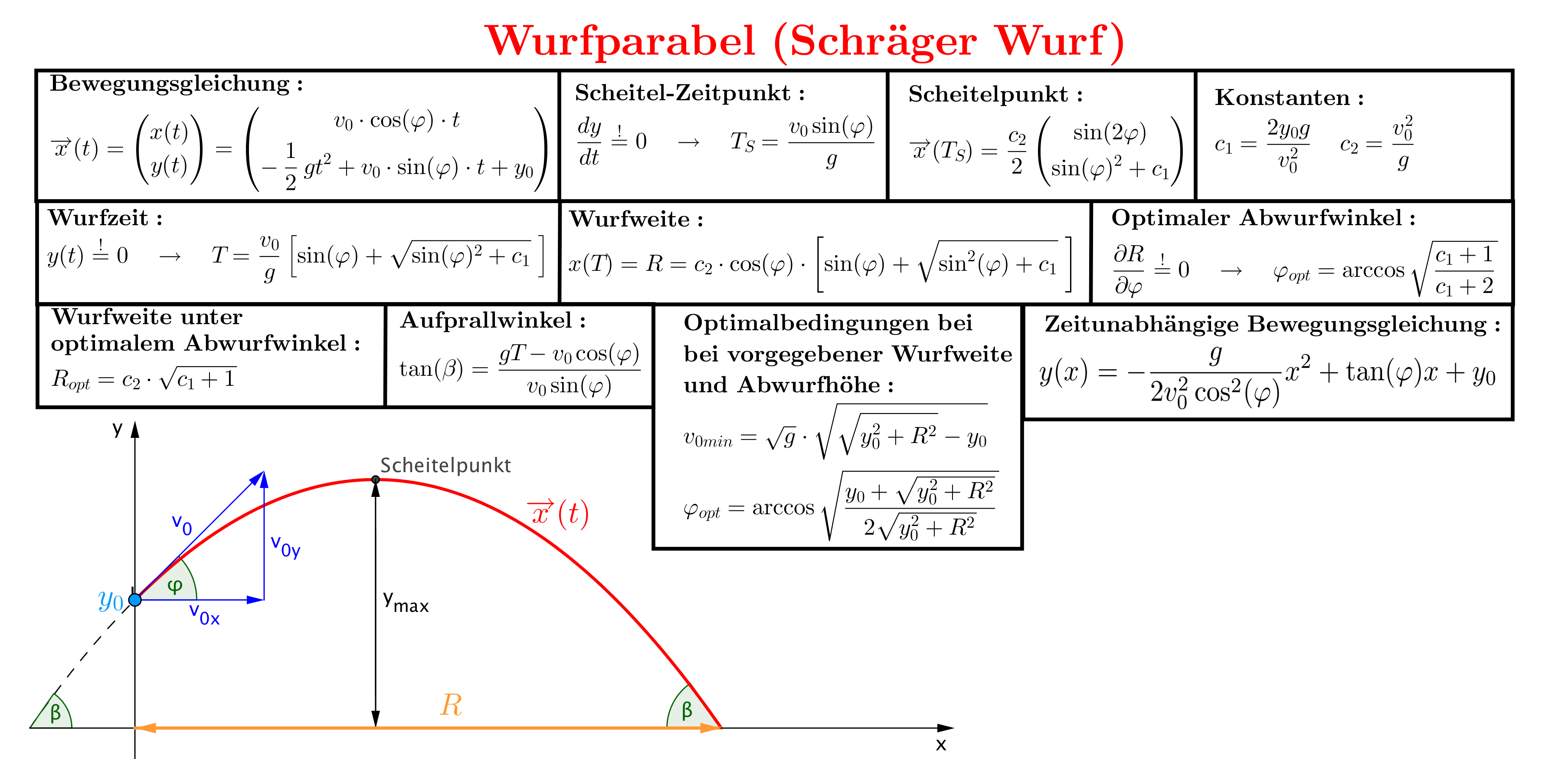 Wurfparabel Zusammenfassung